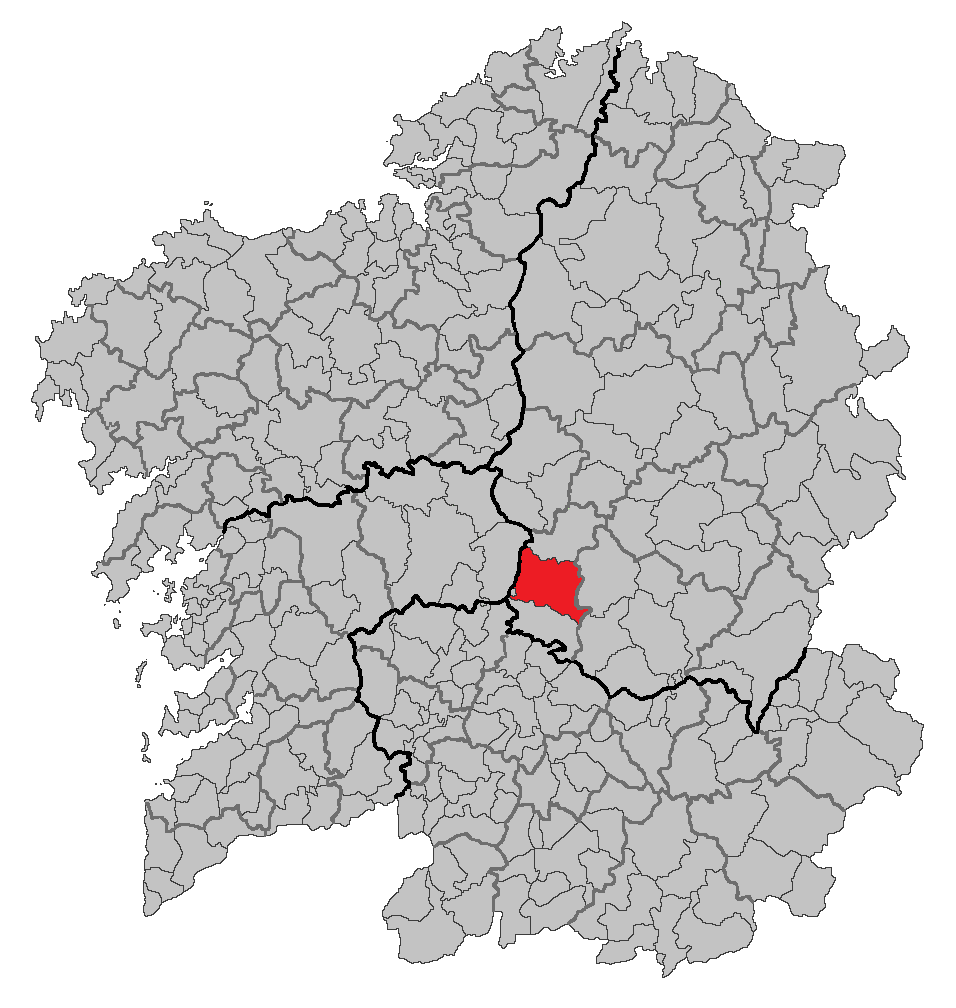 Mapa coa localización do concello de Chantada.